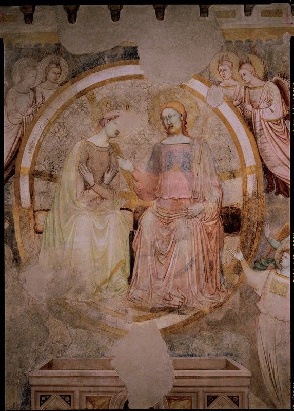 Tiburio dell'abbazia di Chiaravalle, stefano fiorentino 02.jpg